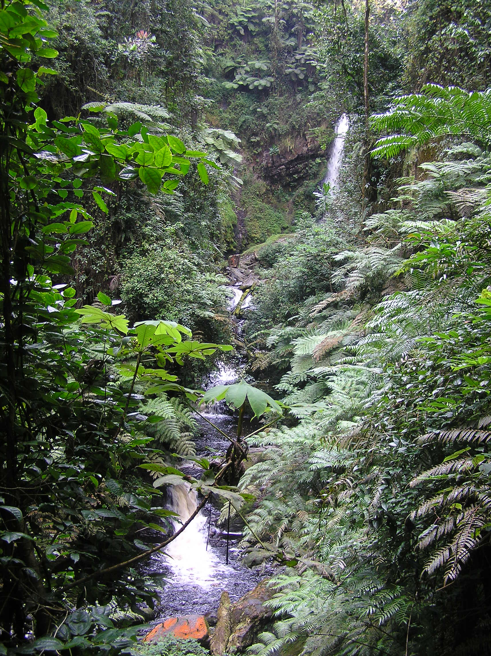 Cours d'eau dans le parc de Nyungwe - Rwanda